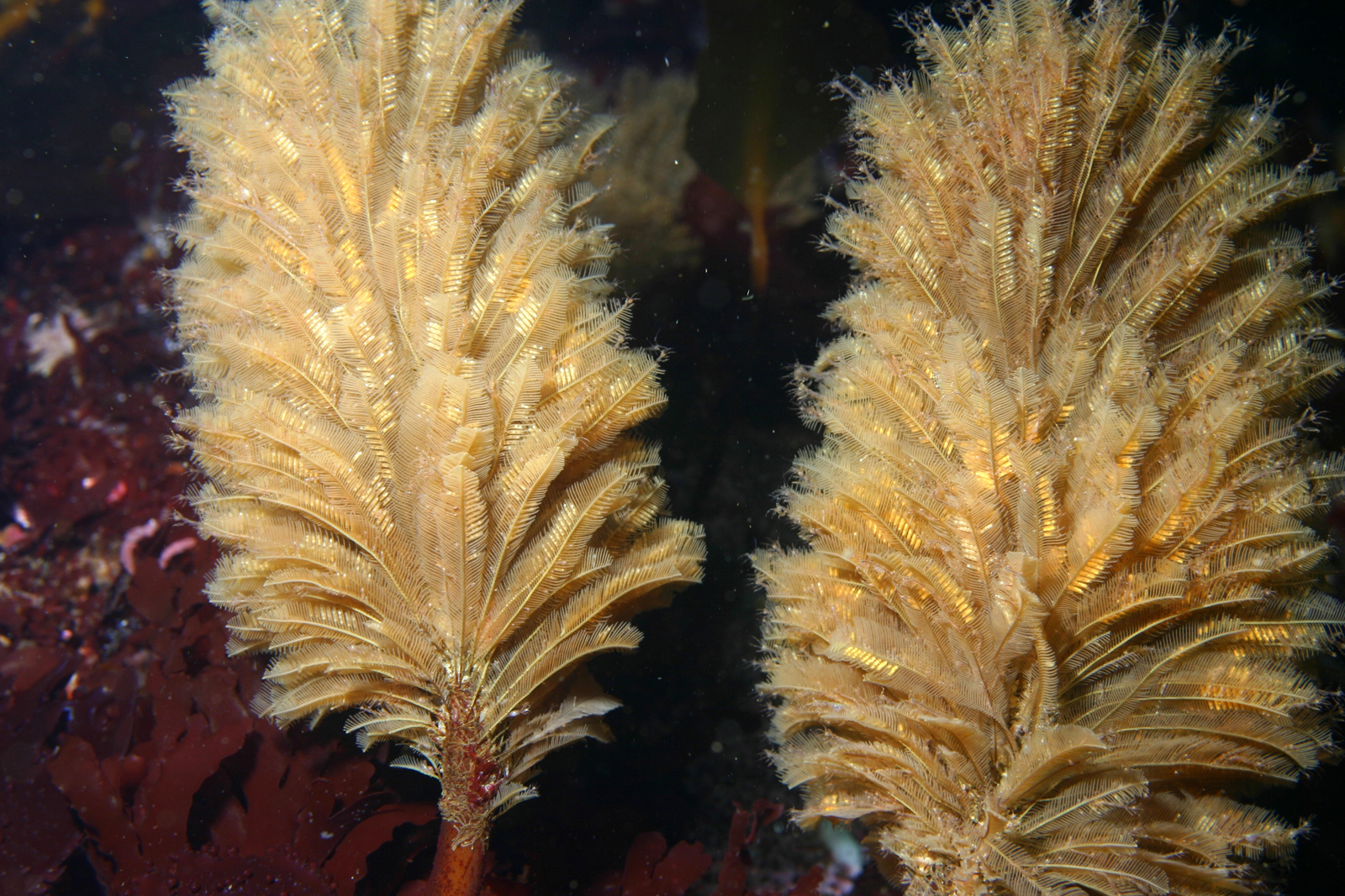 Hidroide Aglaophenia struthionides en Carmel, California